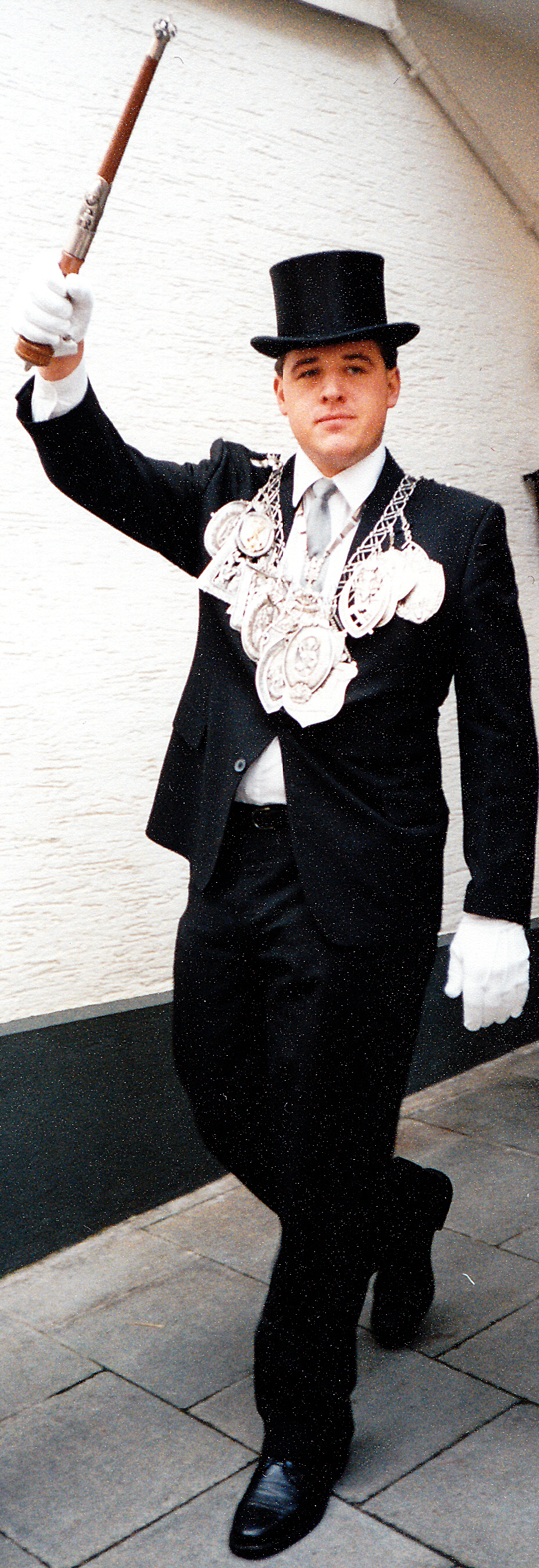 Der Schützenkönig von 1994 in Lantershofen wird in den Festzug präsentiert.